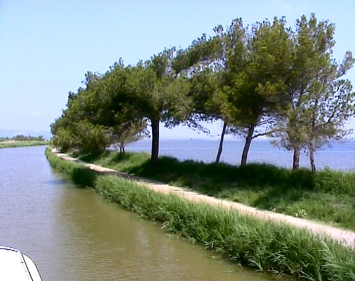 Frankreich, Canal de la Robine, Blickrichtung SW, hinter dem Damm der Étang de Bages et de Sigean